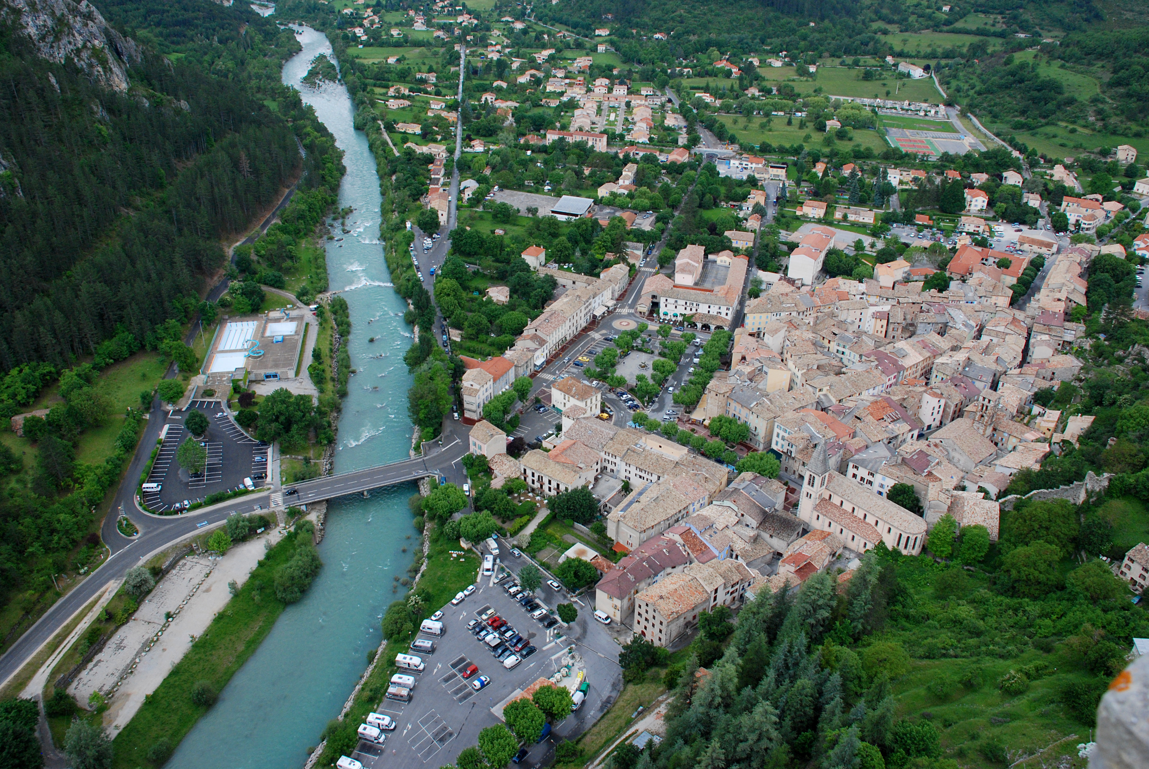 Castellane, view from the rock